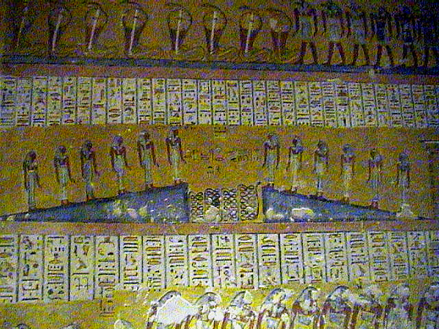 Vallée des Rois - Tombeau de Ramsès IV - XXe dynastie